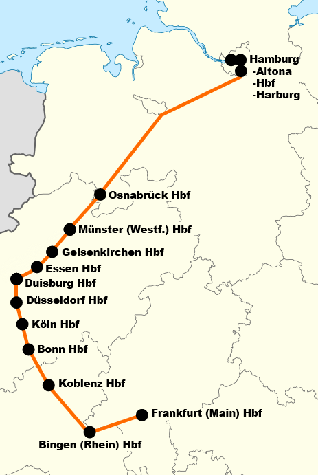 Strecke des Hamburg-Köln-Express ab dem Fahrplanjahr 2016